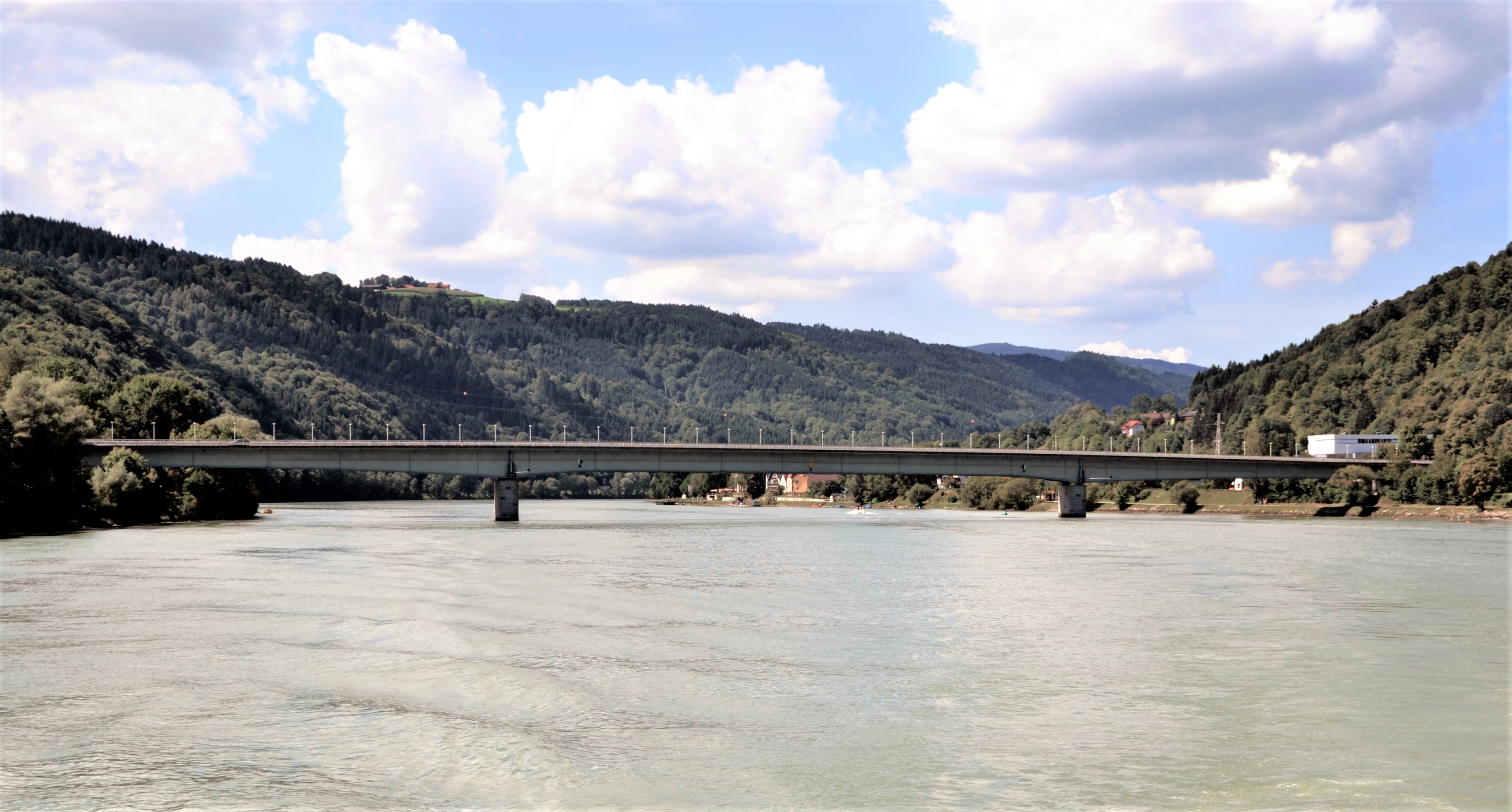 Die Donaubrücke (erbaut im Jahr 1980) in Niederranna im Jahr 2012. Diese Donaubrücke ist die "erste" Brücke über die Donau in Österreich.